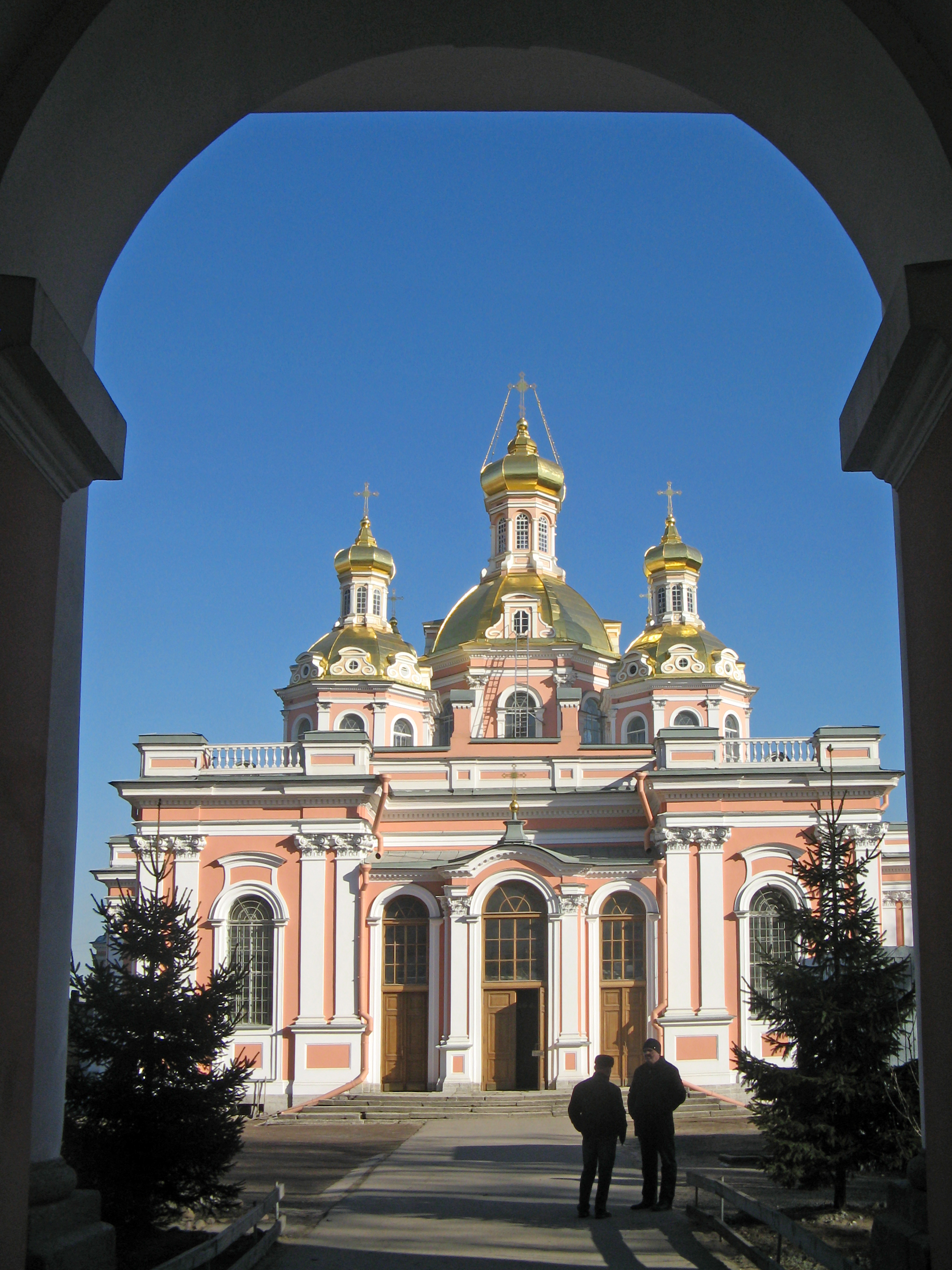 Церковь: Лиговский проспект, 128 литера А, Центральный район, Санкт-Петербург